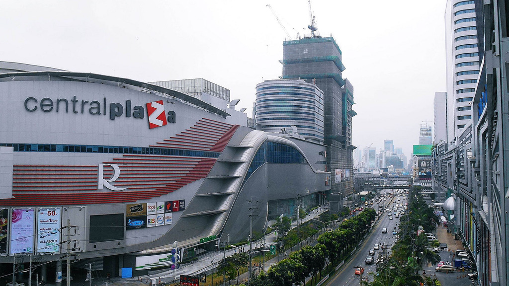 เซ็นทรัลพลาซา แกรนด์ พระราม 9